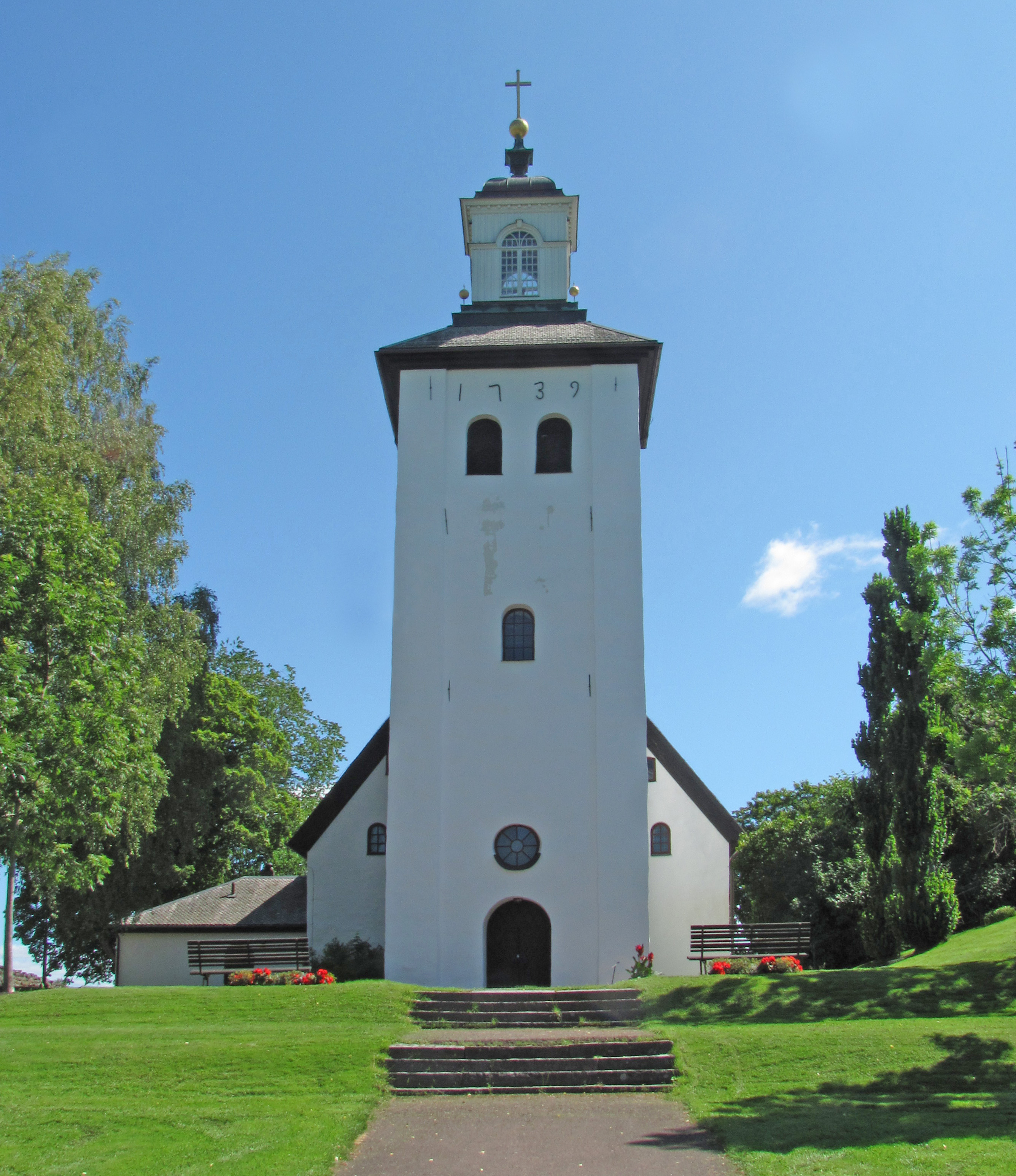 Grums kyrka